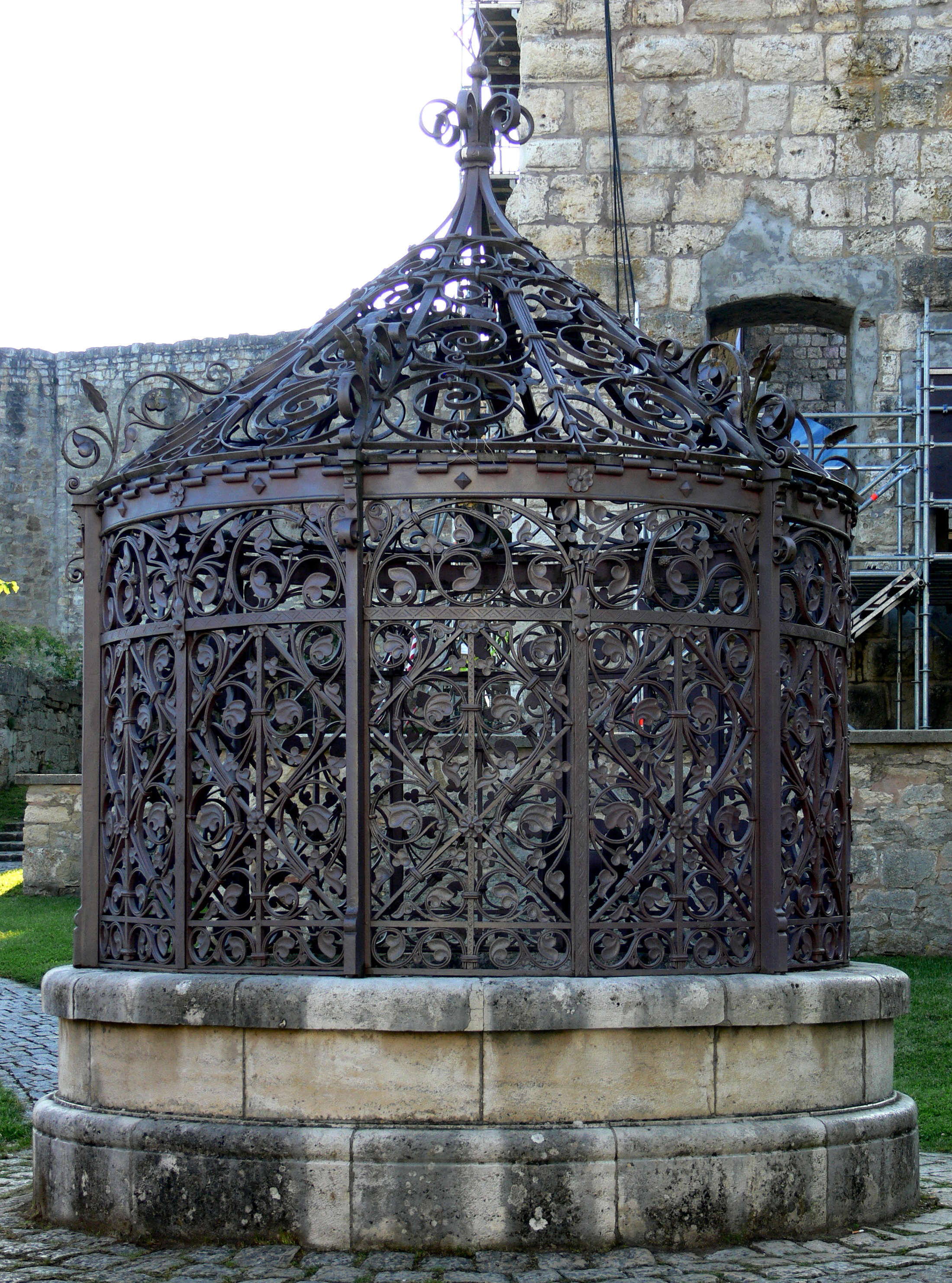 Schloss Hellenstein, Heidenheim an der Brenz Brunnengarten, schmiedeeisernes Gitter um den 78 m tiefen Kindlesbrunnen